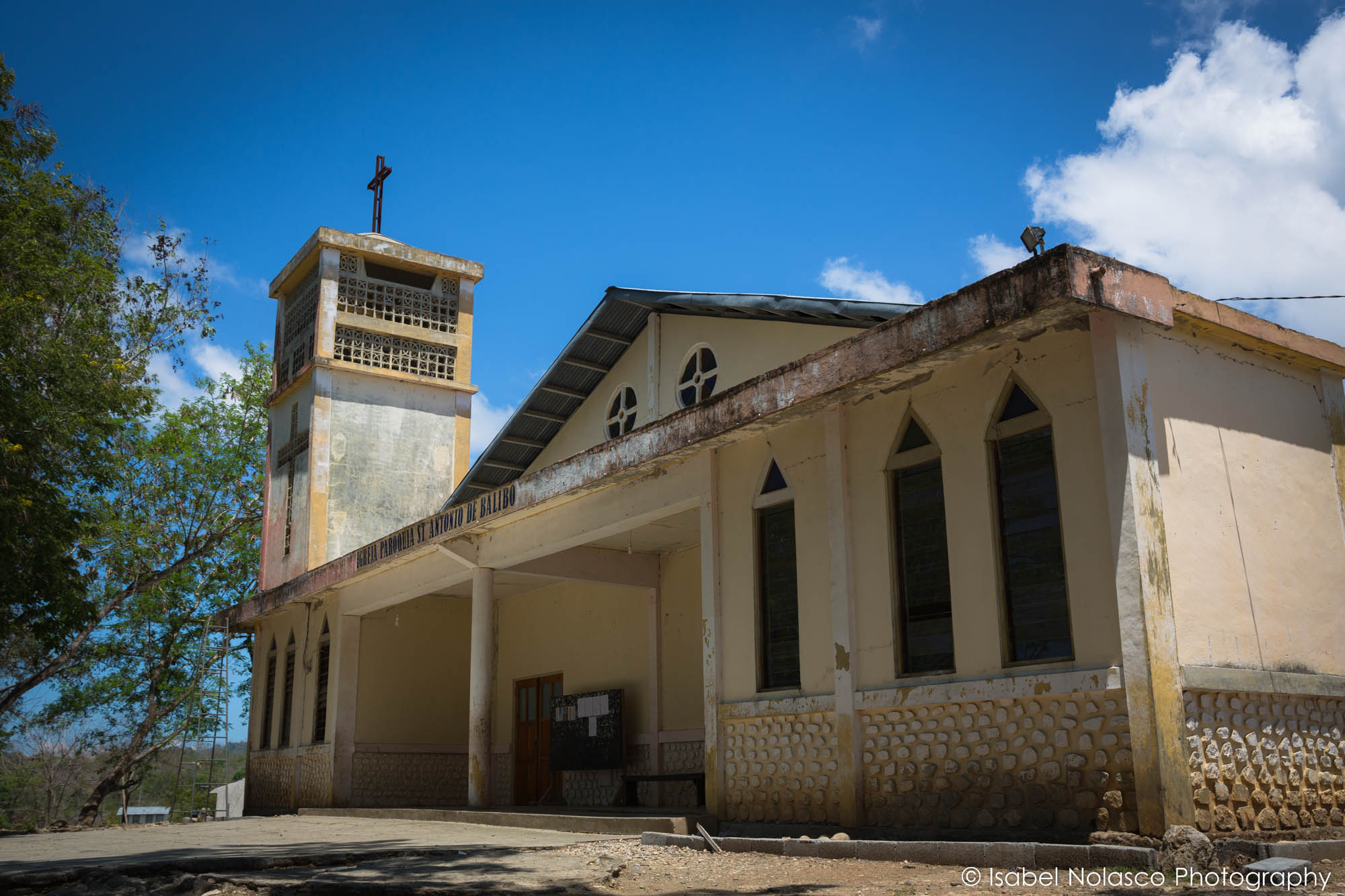 Igreja de Santo António (Balibo)